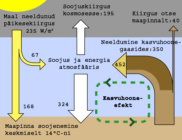 Kasvuhooneefekti skeem